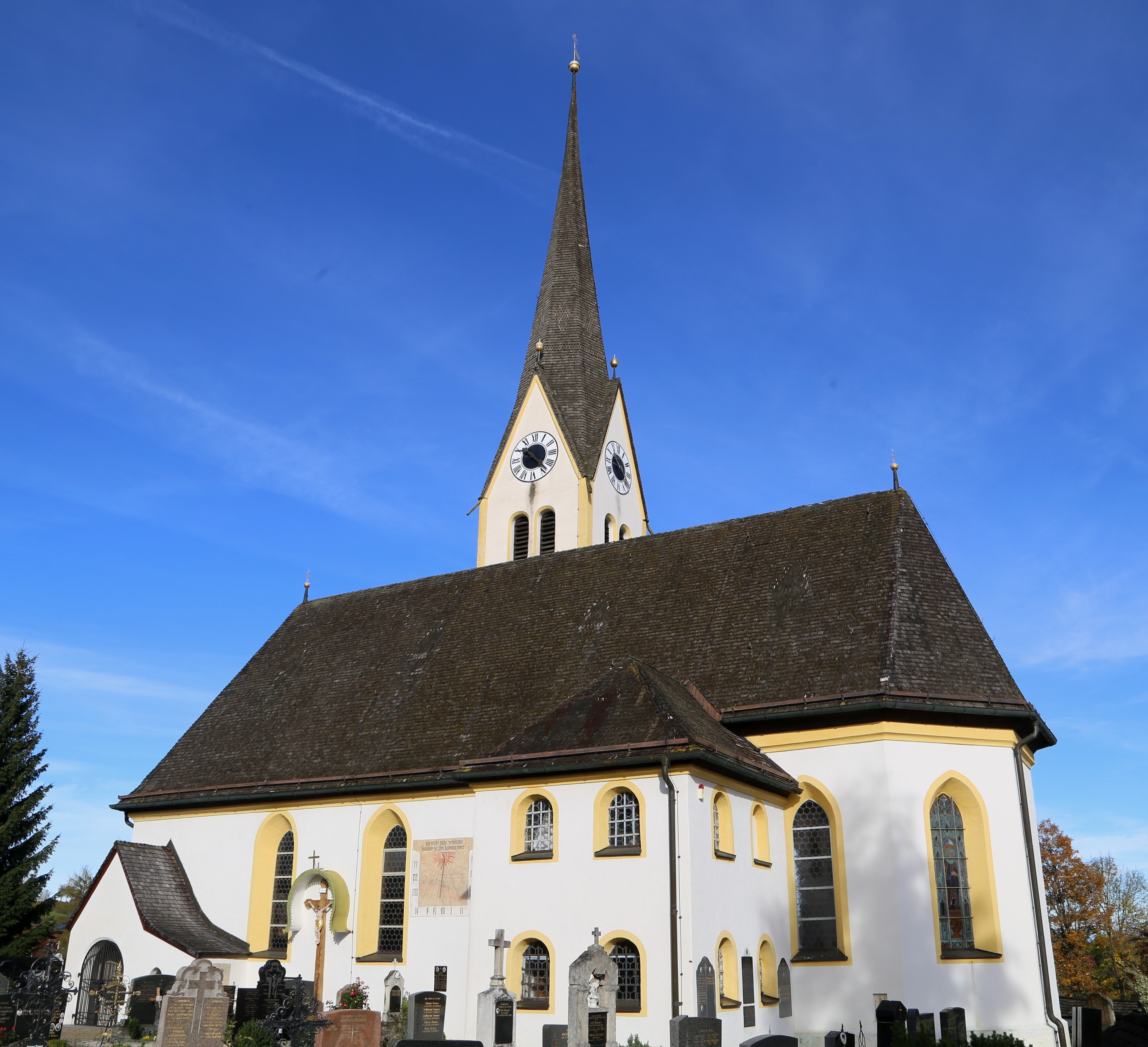 Katholische Pfarrkirche St. Agatha, Agatharied, Hausham; Spätgotischer Saalbau mit polygonalem Chor und Nordturm, 1505, um 1670 westlich erweitert und Chor barockisiert; mit Ausstattung